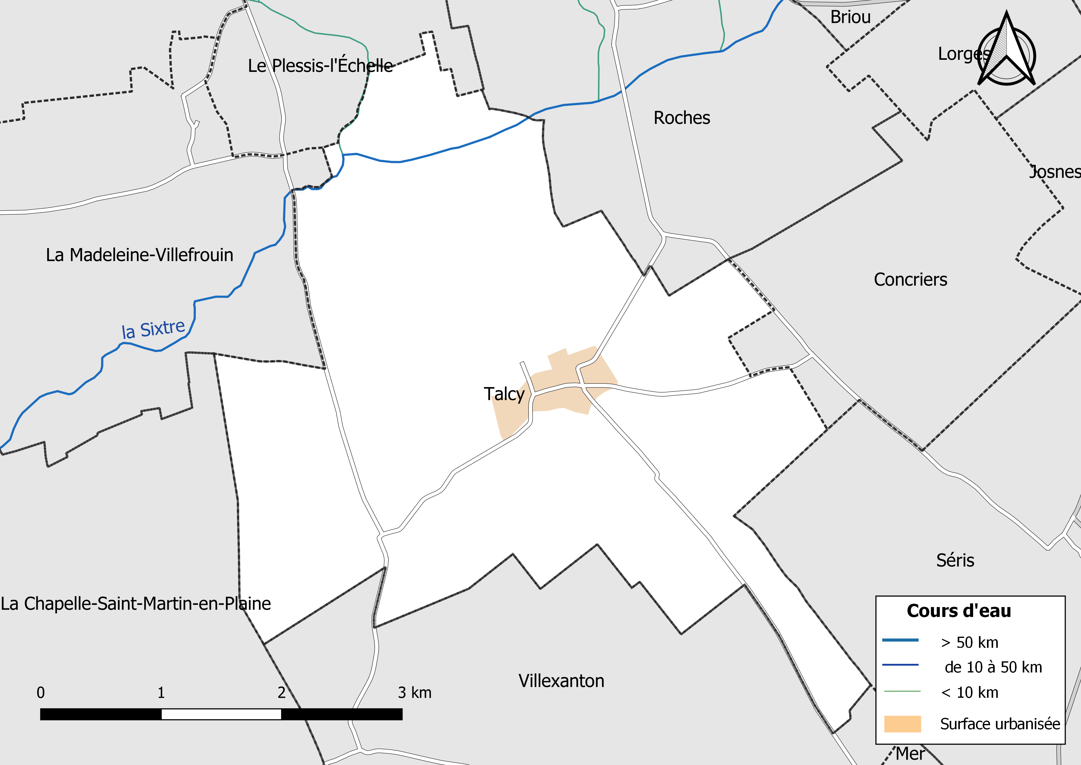 Carte du réseau hydrographique de la commune de Talcy (Loir-et-Cher) (France).